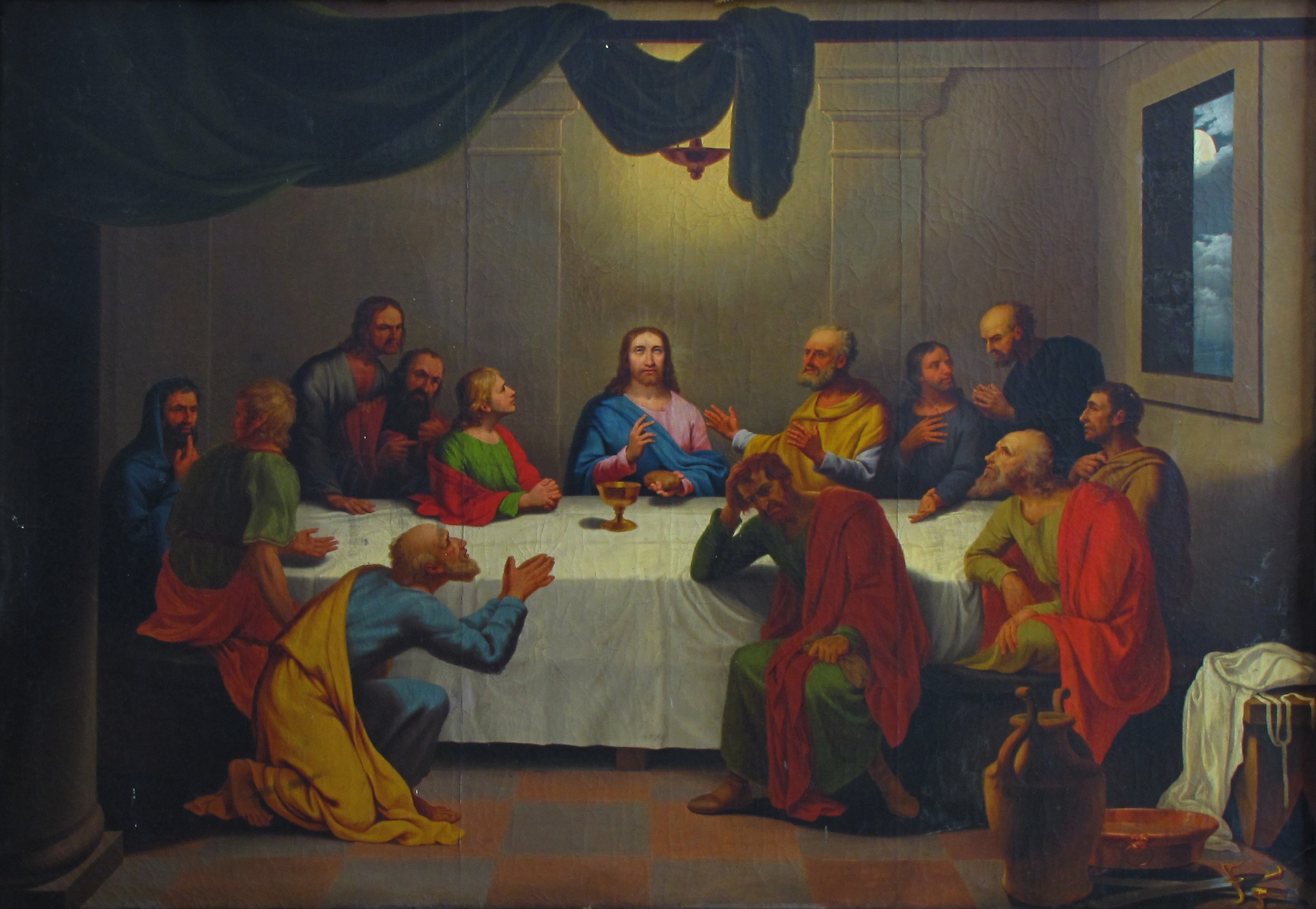 Alsace, Bas-Rhin, Sélestat, Église Saint-Georges (PA00084978, IA00124588). Tableau "Sainte Cène" (Georges Antoine KEMAN, huile sur toile, 280x350, vers 1830)